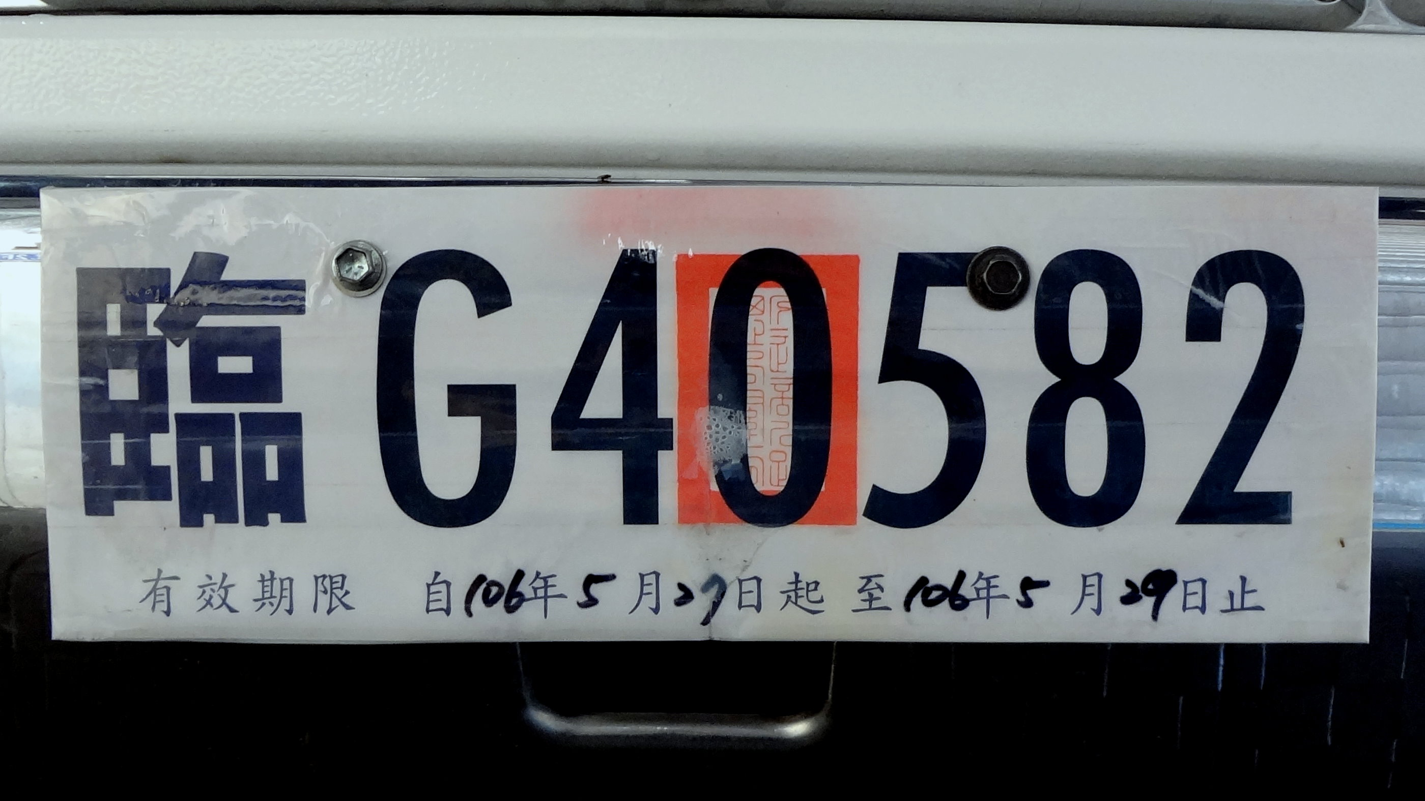 交通部公路總局汽車臨時號牌「臨G40582」，中央印交通部公路總局關防，下方印有效期限。